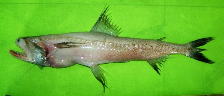 Bombajka (Harpadon nehereus)